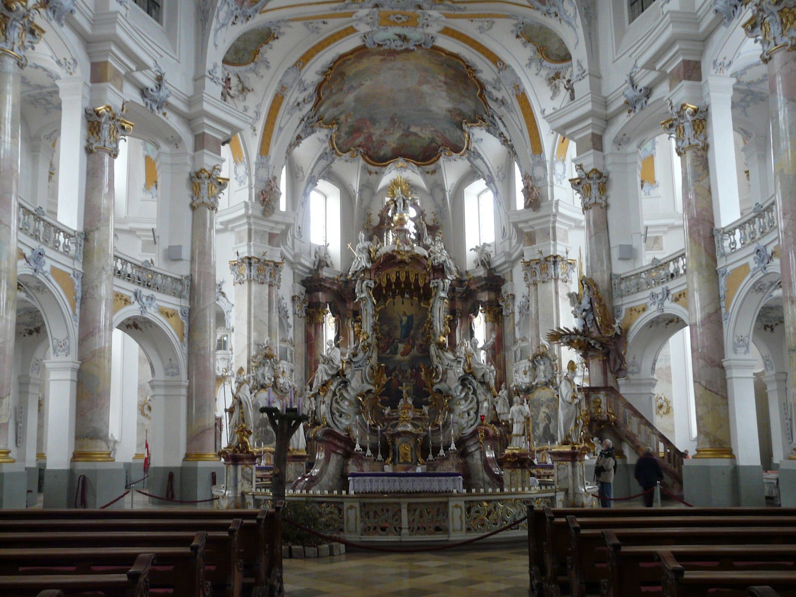 Gnadenaltar. Die Basilika Vierzehnheiligen bei Bad Staffelstein im Landkreis Lichtenfels ist eine Wallfahrtskirchen in Oberfranken. The Altar of the Vierzehnheiligen represented by the fourteen holy helpers. Basilica of the Fourteen Holy Helpers, Bad Staffelstein near Bamberg, in Bavaria, Germany